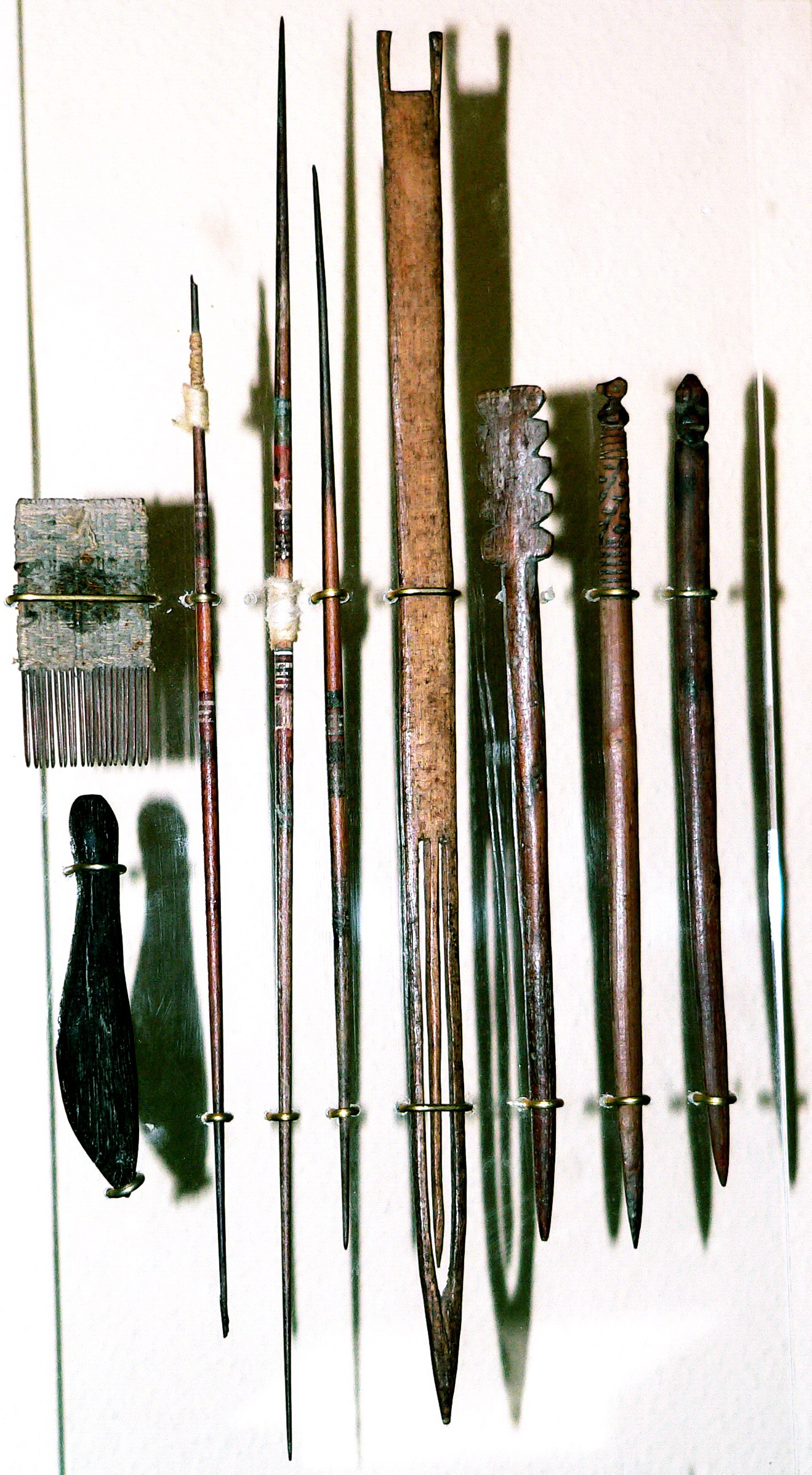 Descripción: Utensilios de costura Antigüedad: Entre 1.200 y 1.470 d.C Cultura: Cultura Chancay País : Perú Fotógrafo: © Manuel González Olaechea y Franco Fecha de la foto : 25 de abril de 2008